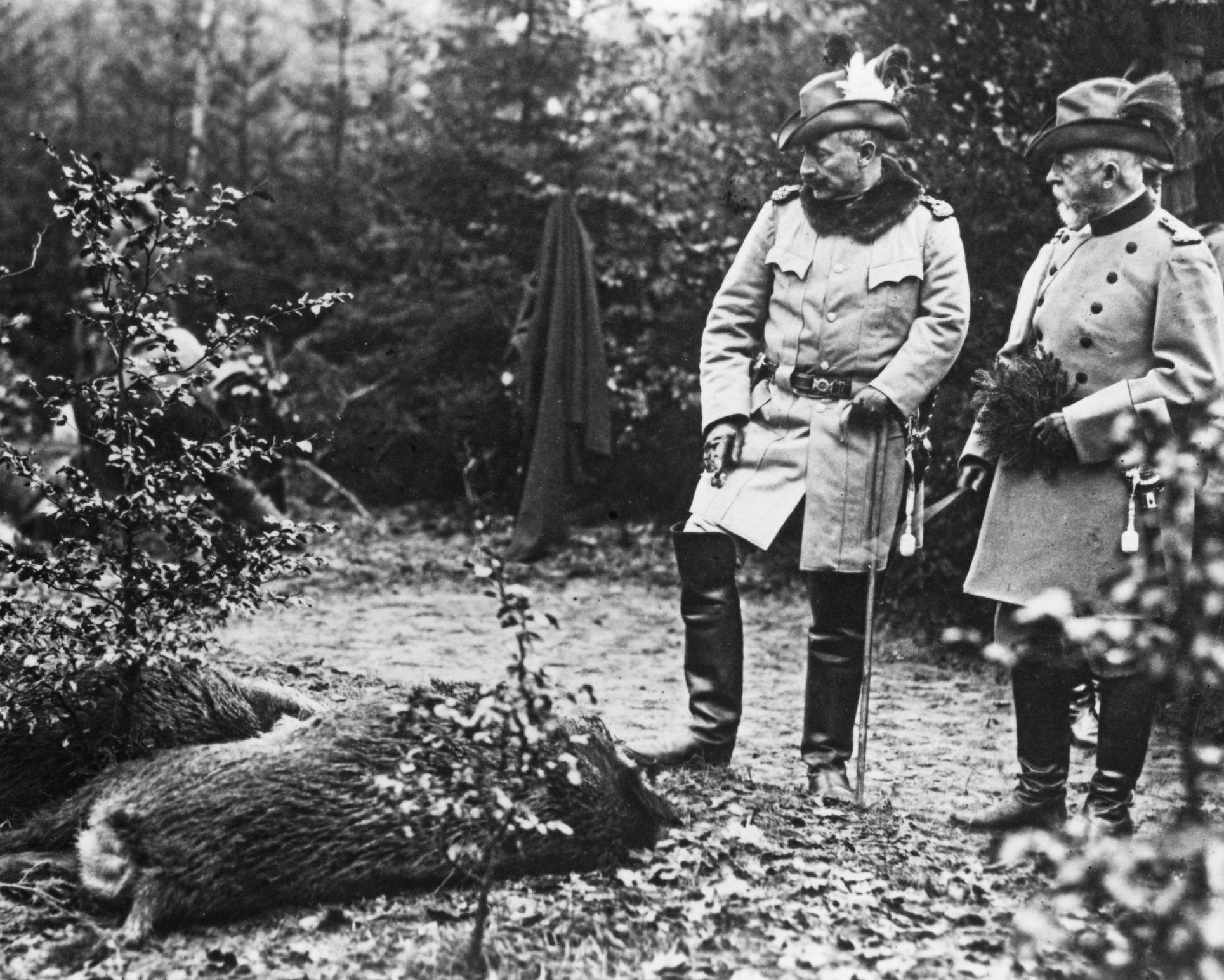 Wilhelm II. Sauenjagd cropped